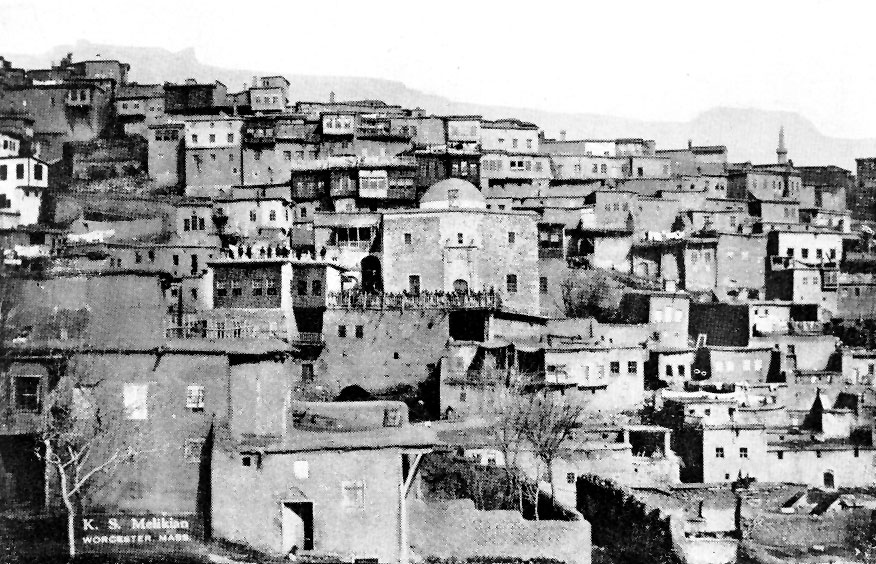 Aziz Hagop Kilisesi ve Kentronakan Ermeni Milli Okulu, Harput